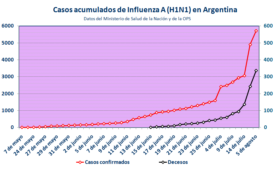 Casos de Gripe A (H1N1) en Argentina - Acumulado 2009